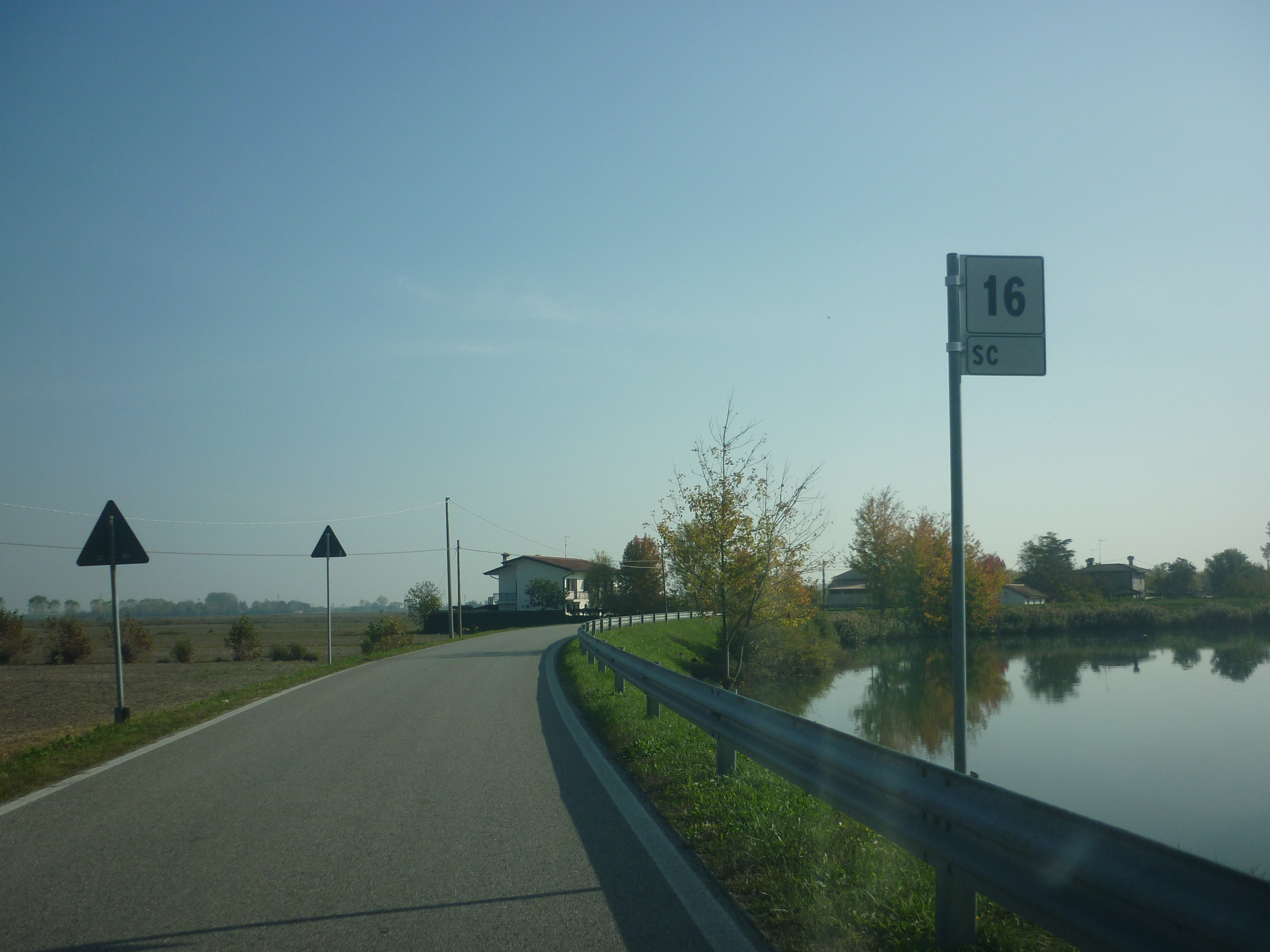 strada comunale in provincia di treviso